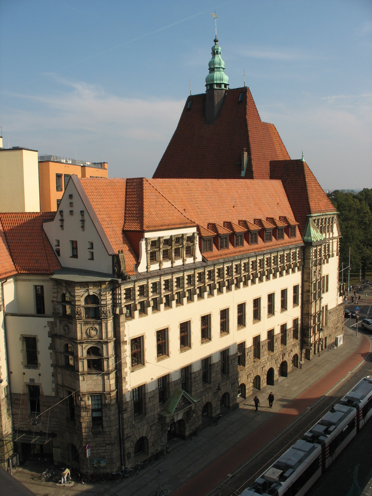 Bremen, Polizeihaus Am Wall / Ostertorstraße. Das abgebildete Objekt ist ein geschütztes Kulturdenkmal in der Freien Hansestadt Bremen, mit der Nr. 0083 beim Landesamt für Denkmalpflege registriert.